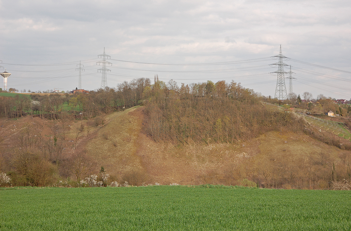 Schlüsselberg mit Burgstall der Schlüsselburg bei Markgröningen (von Westen). Links Wasserturm, rechts Weinberge.